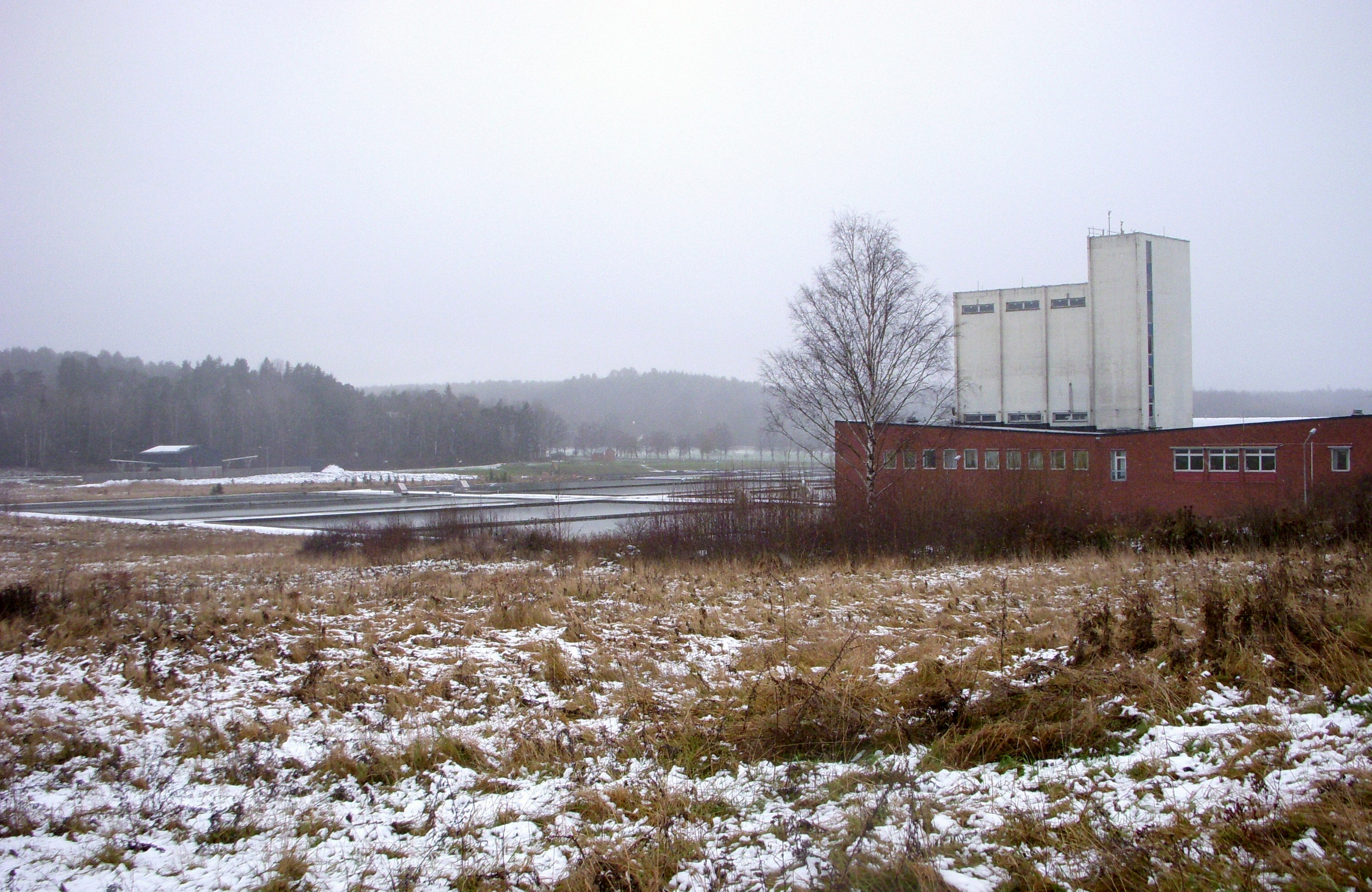 Norsborgs vattenverk, östra verket